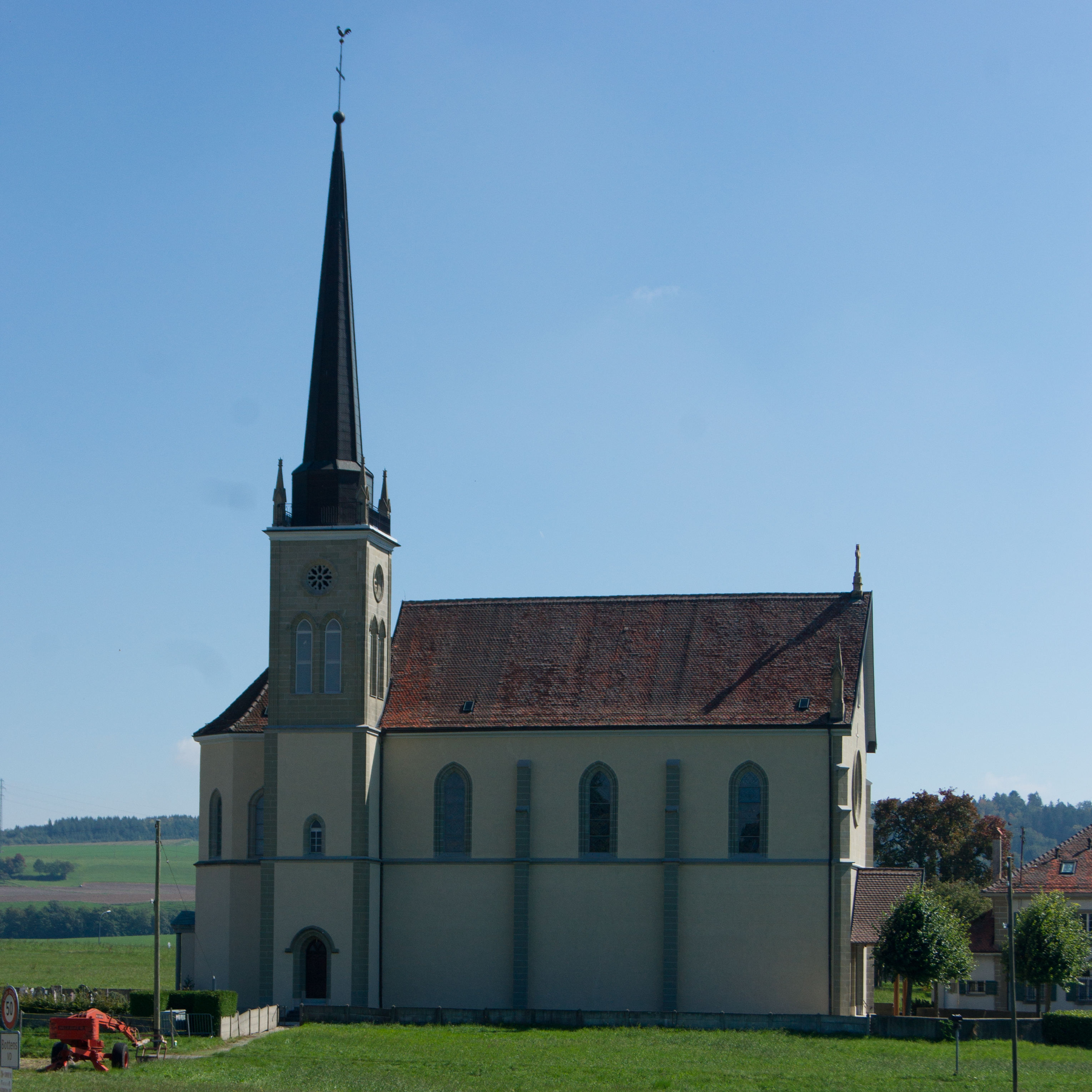 Eglise Saint-Etienne de Bottens